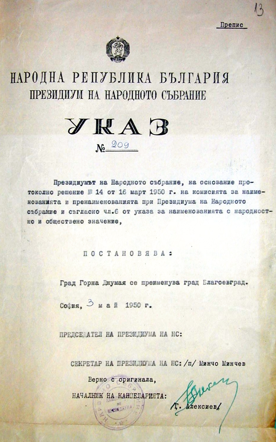 Указ на Президиума на Народното събрание за преименуване на град Горна Джумая в Благоевград.